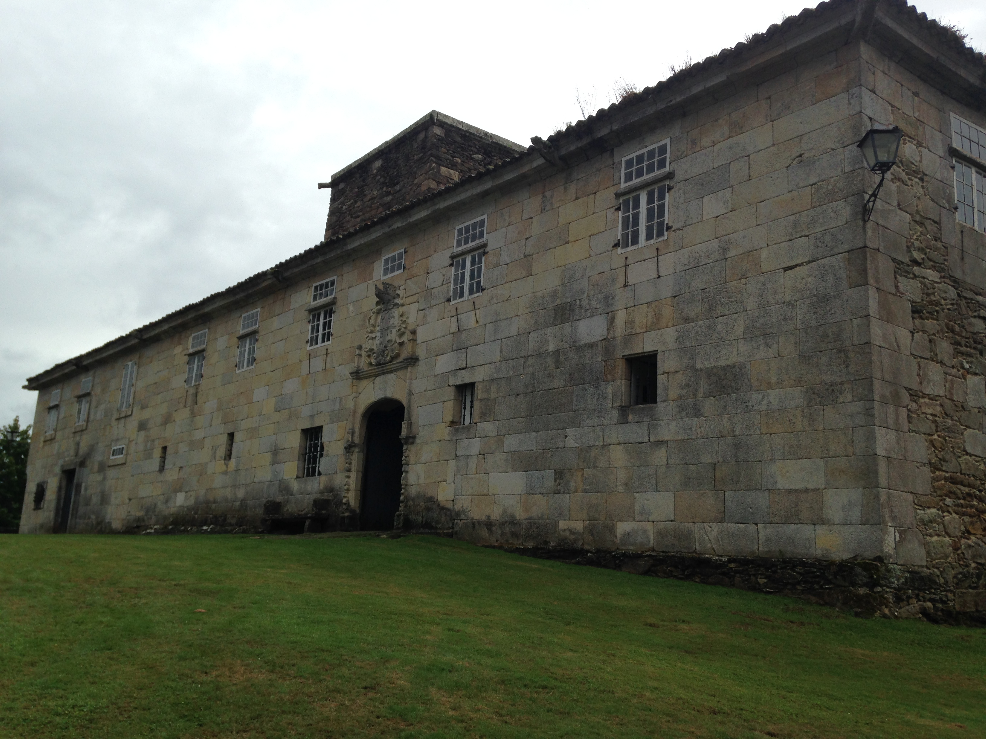 Unha das fachadas do Pazo de Vilardefrancos (Carballo)